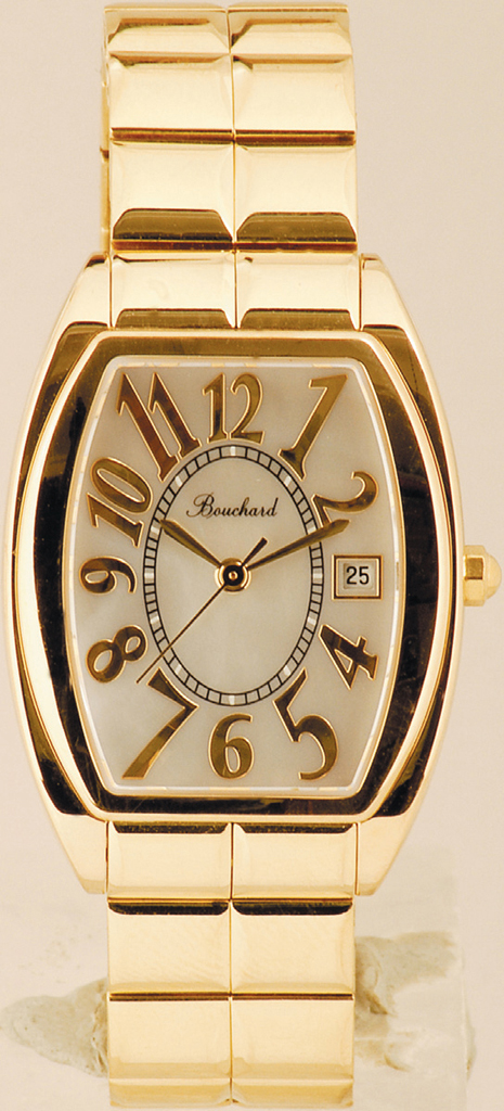 JPC, Zaandam